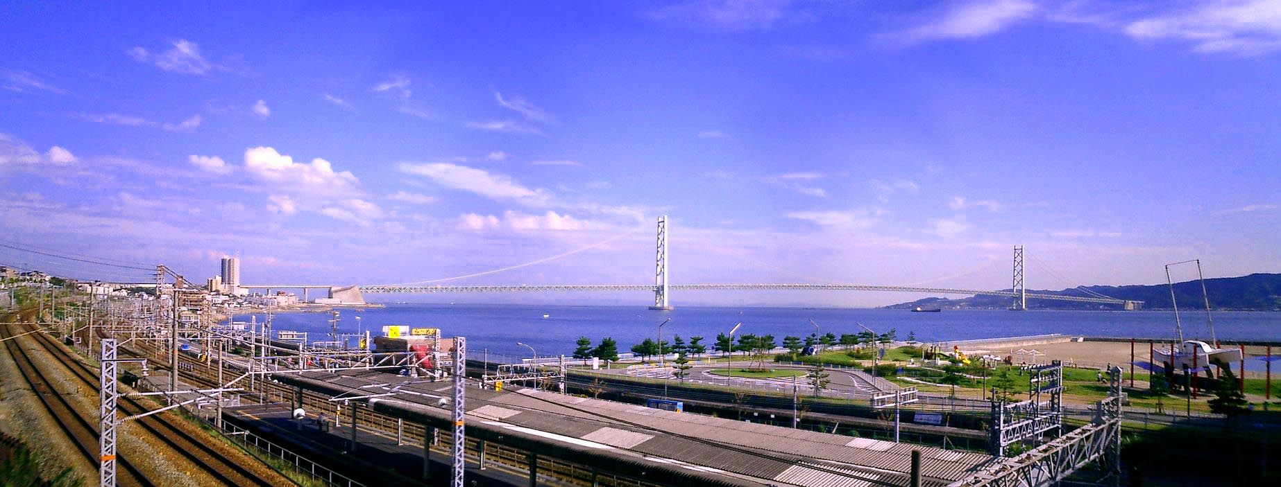 Akashi_kaikyo_ohashi 明石海峡大橋